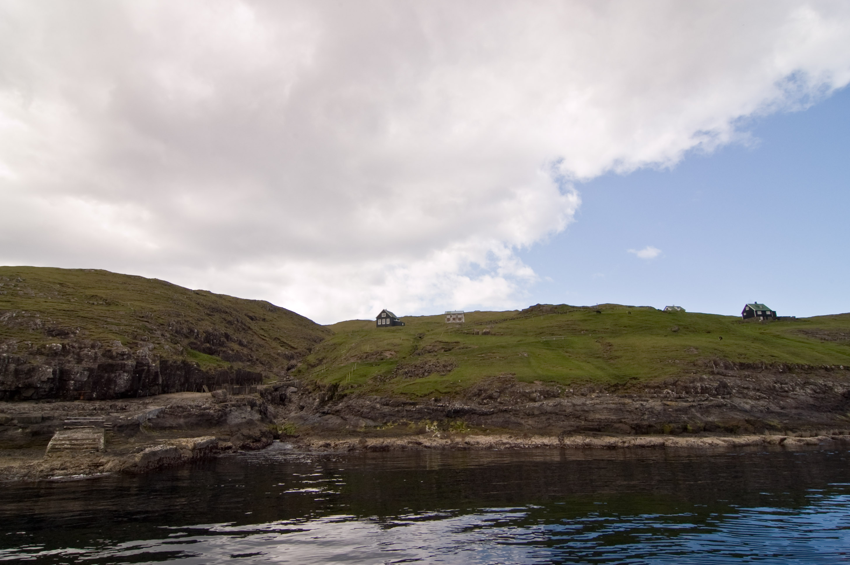 Slættanes, Faroe Islands